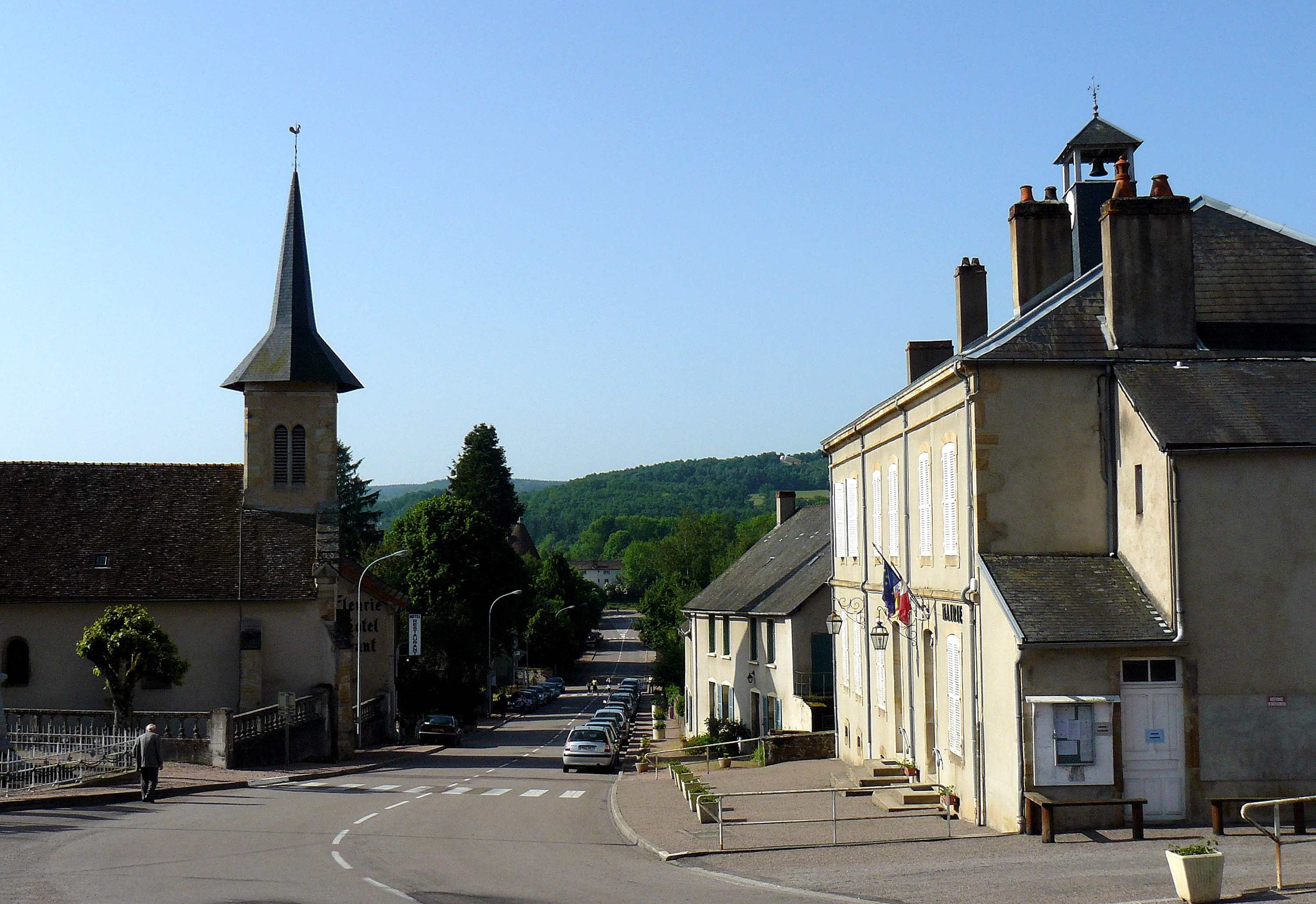 Chissey-en-Morvan (Saône-et-Loire, France)